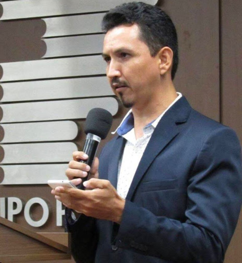 Augusto Branco, poeta brasileiro